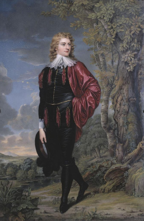 Peinture sur émail (30.2 x 20.2 cm) représentant Henry Philip Hope, réalisée en 1802 par Henry Bone d'après un portrait peint par Guy Head à Rome en 1795. Acquis en 1928 par le musée Cognacq-Jay (inventaire : J 786).